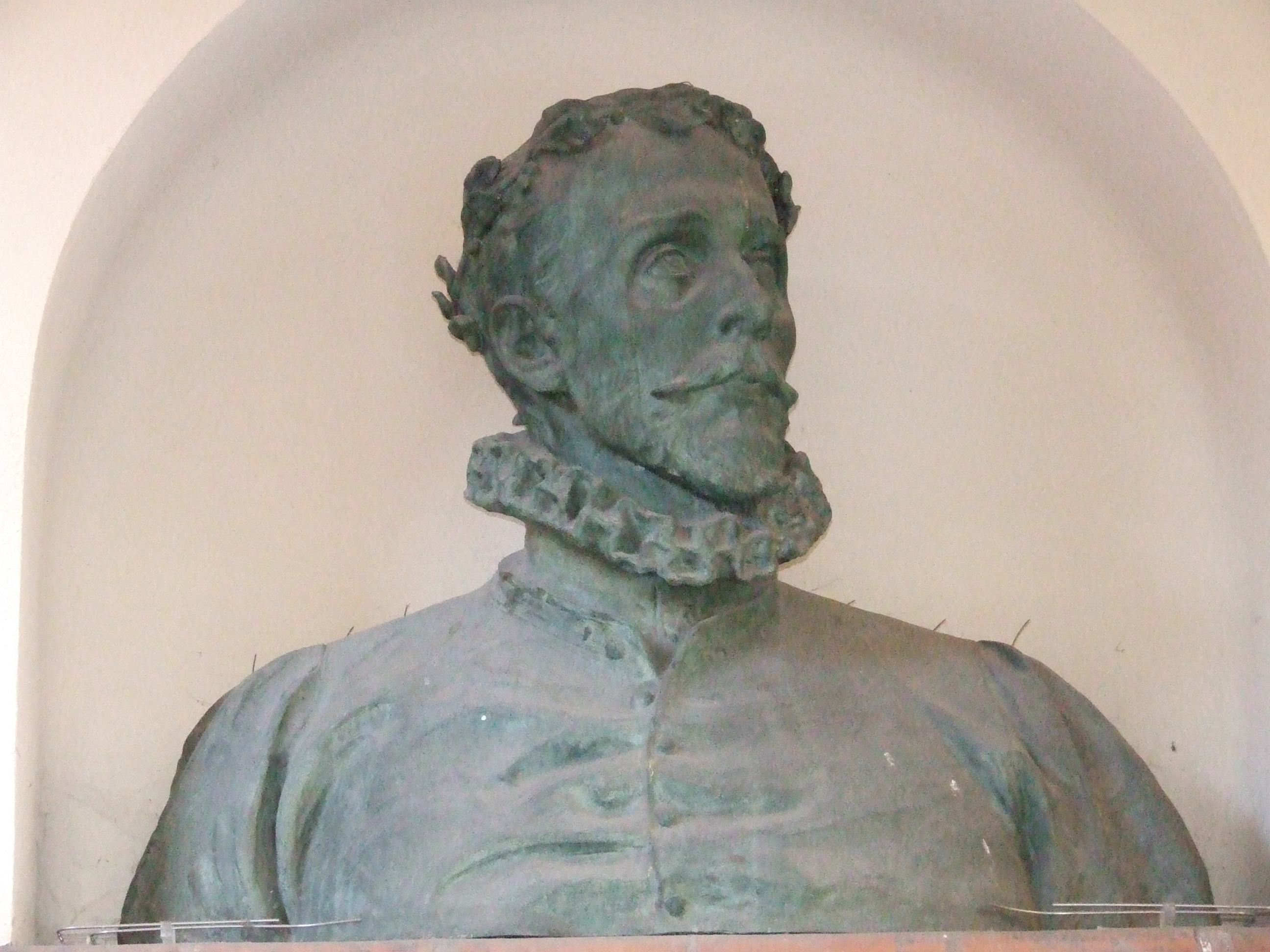 Busto di Torquato Tasso, opera di Ettore Ximenes